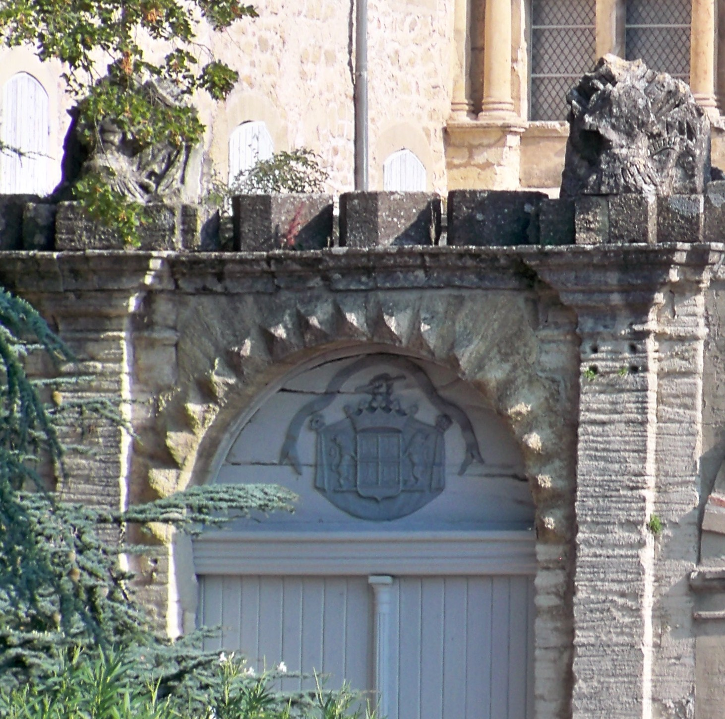 Terre de Causanscommuns, église, presbytère, cour, jardin, parc, clôture, portail, maison, élévation, Route de Violès (Inscrit, 1997) : Blason de la famille Mauléo de Causans .